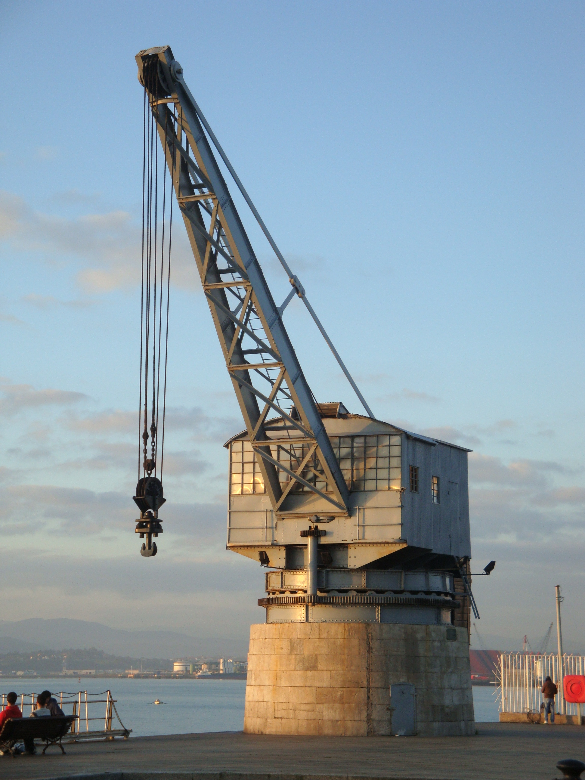 Grúa del puerto de santander